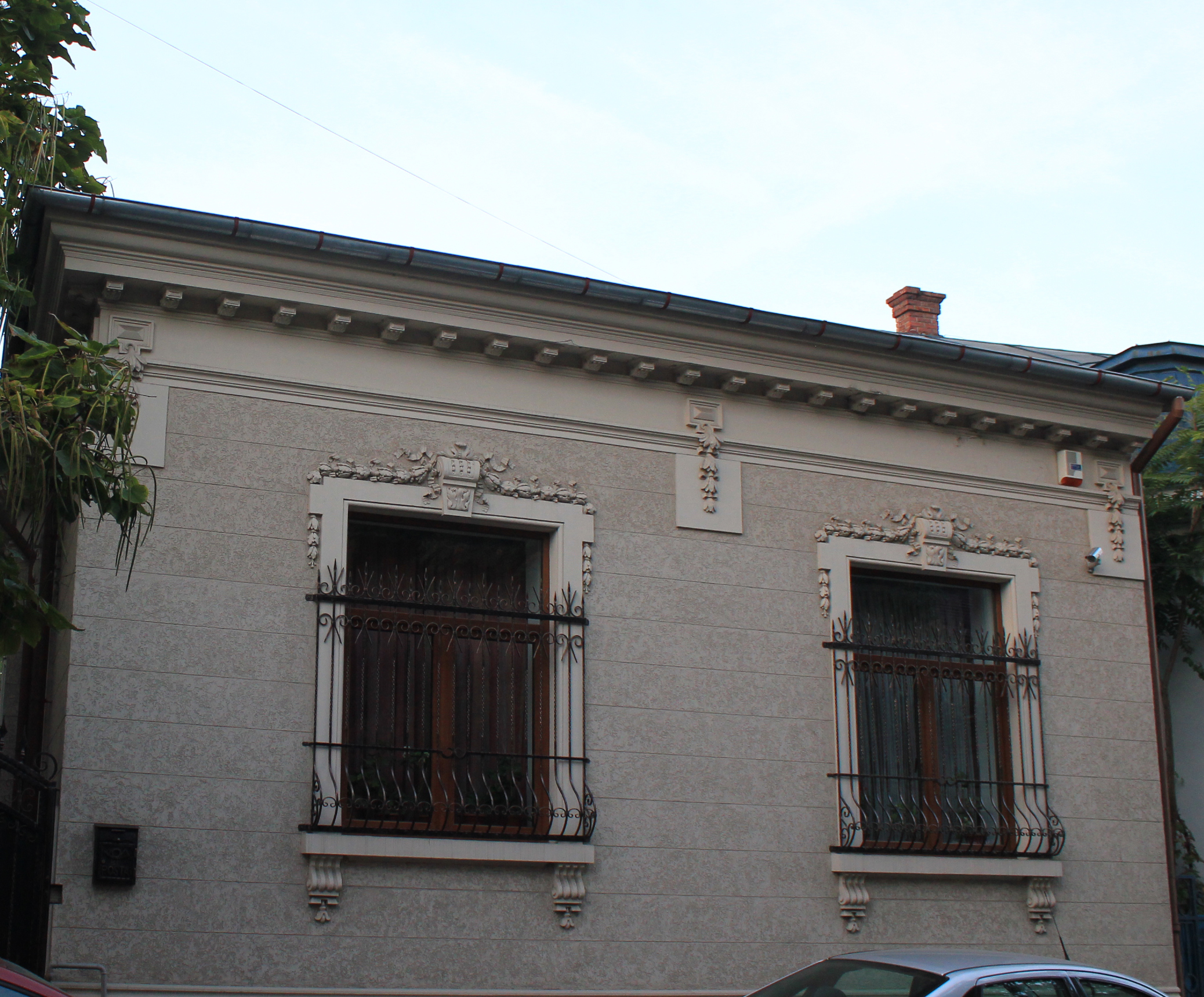 Casă Georgescu Mihail 21